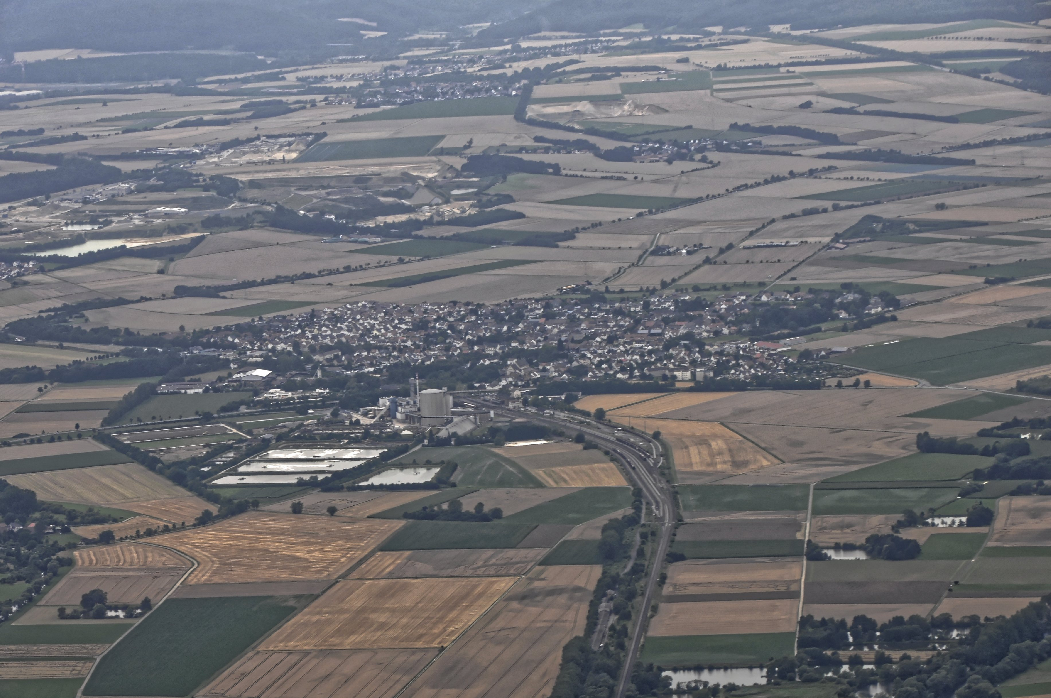 Bilder vom Flug Nordholz-Hammelburg 2015: Wabern im nordhessischen Schwalm-Eder-Kreis.